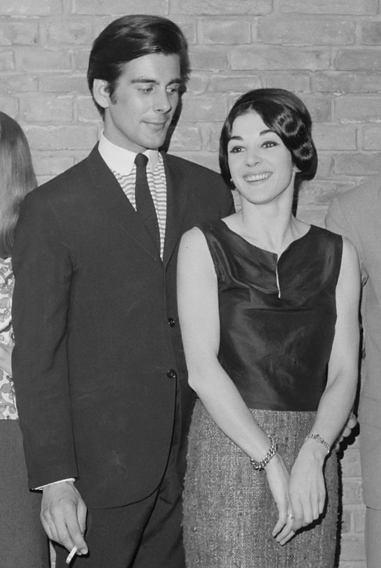 Royal Ballet uit Engeland in Hiltonhotel te Amsterdam, v.l.n.r. Donald MacLeary, Elizabeth Anderton